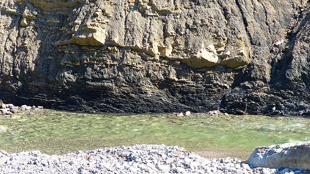 Neidernach Uferaufschluss